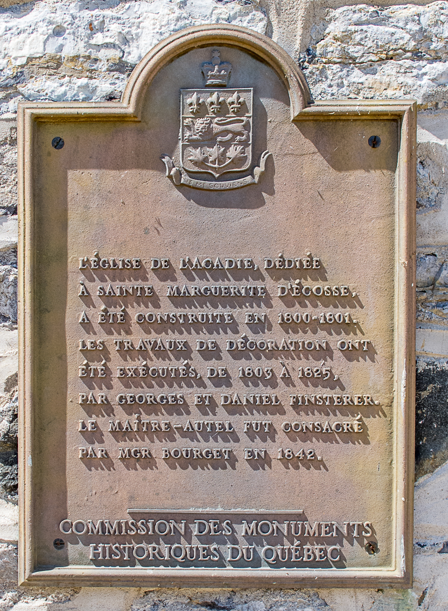 Plaque de la Commission des Monuments historiques du Québec